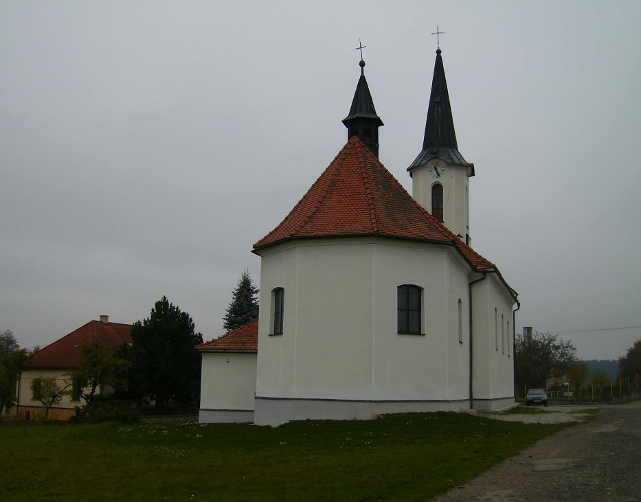 Česky: Kostel zasvěcený panně Marii ve Březí u Velké Bíteše